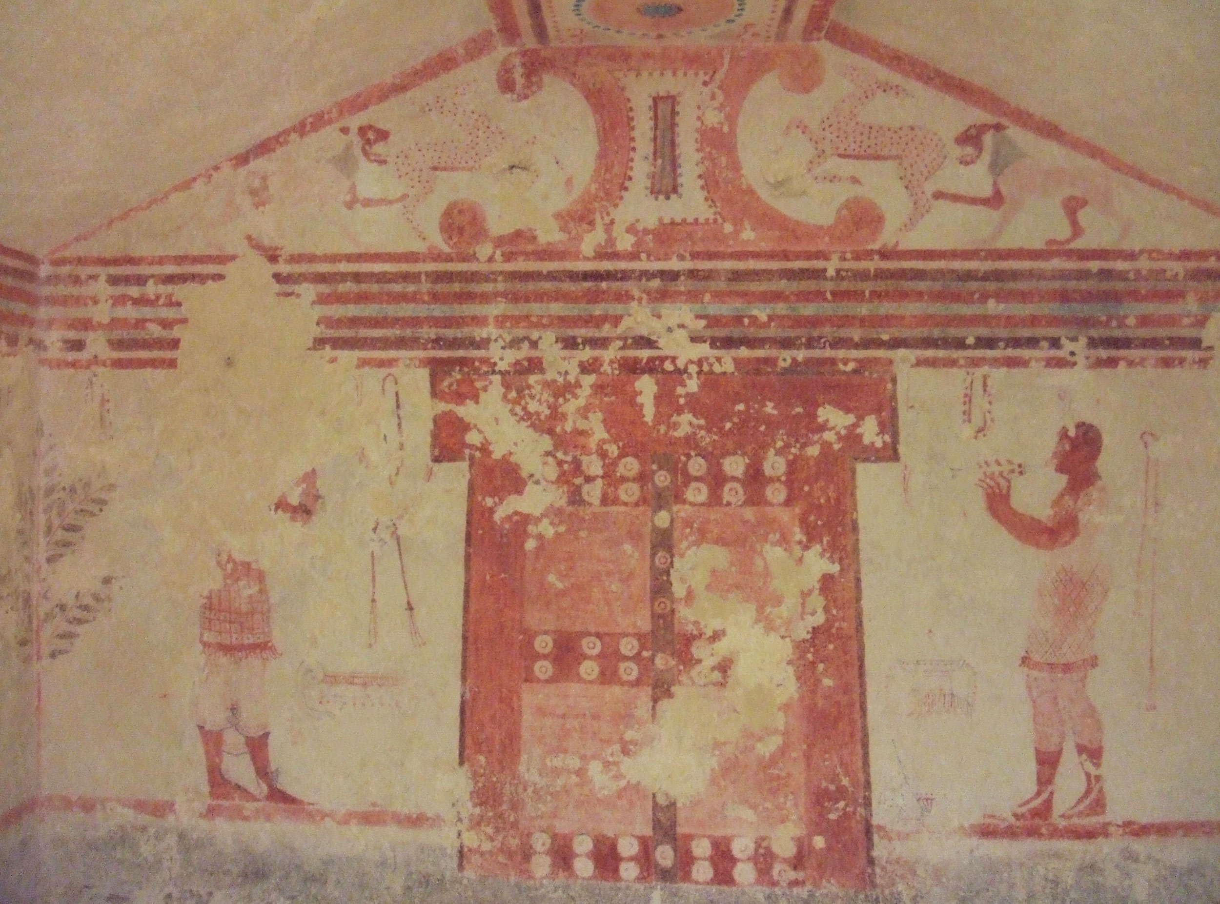 Fresquede la porte des enfers de la Tombe Cardarelli du site de Monterozzi (Latium - Italie)